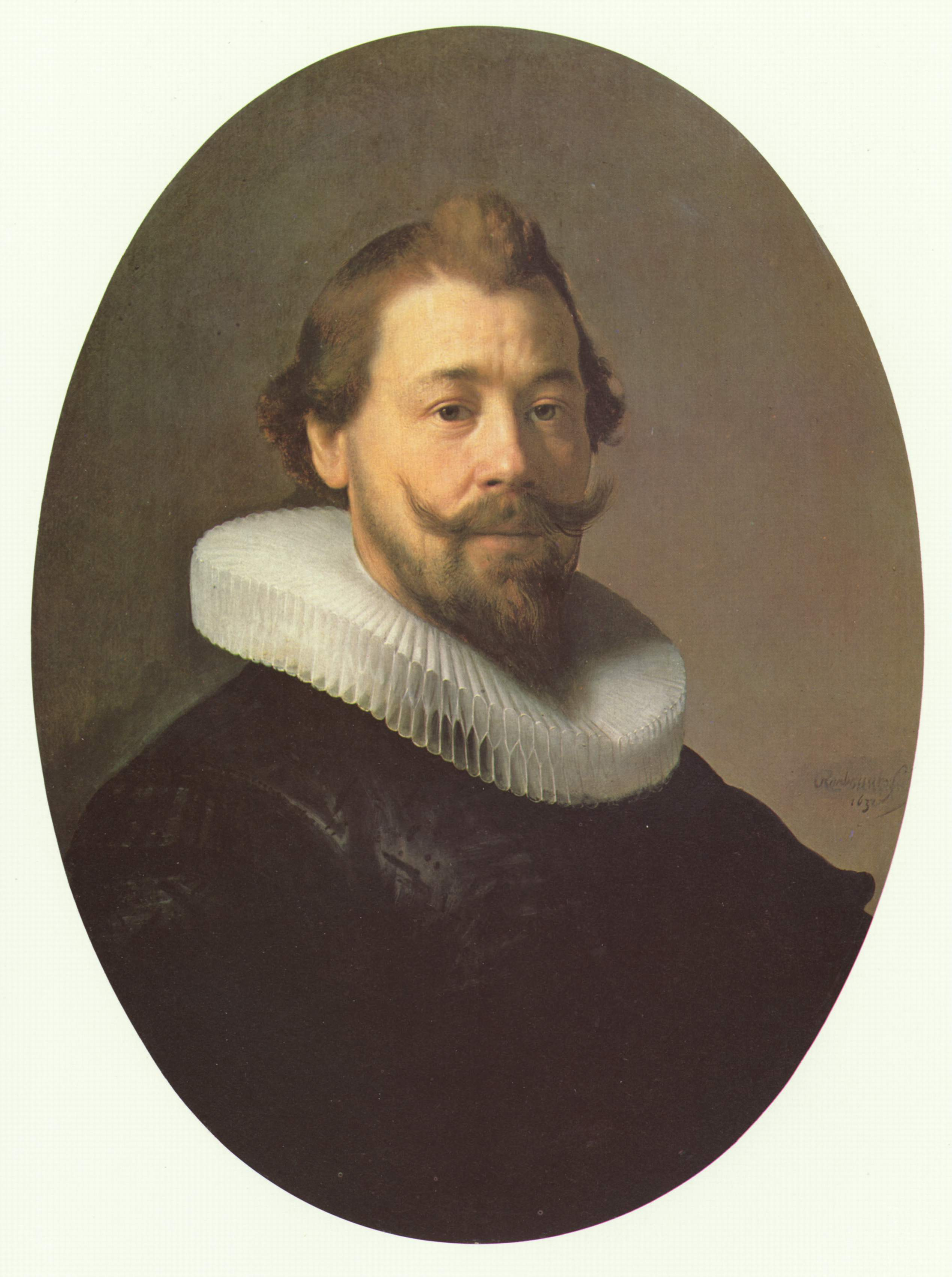 Pendant of File:Rembrandt 228.jpg